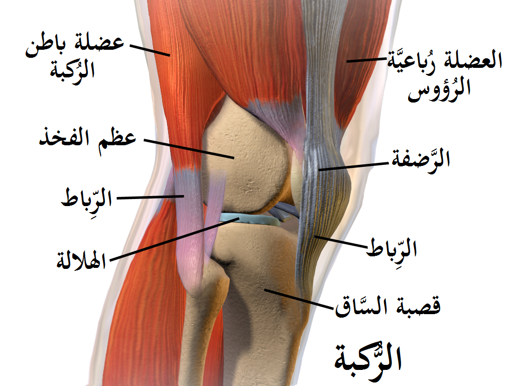 تشريح رُكبة الإنسان. انظر مقاطع مُتحرِّكة مُرتبطة حول هذا الموضوع الطبي.